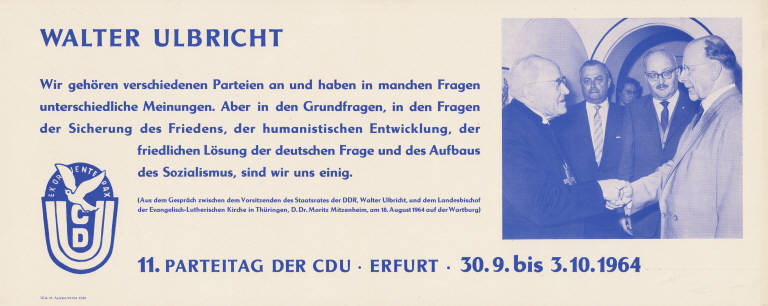 Wir gehören verschiedenen Parteien an ... Aber in den Grundfragen, in den Fragen der Sicherung des Friedens, der humanistischen Entwicklung, der friedlichen Lösung der deutschen Frage und des Aufbaus des Sozialismus, sind wir einig.Abbildung:Parteilogo - Walter Ulbricht im Gespräch mit Landesbischof D. Dr. Moritz Mitzenheim am 18. August 1964 auf der WartburgPlakatart:Kandidaten-/Personenplakat mit PorträtDrucker_Druckart_Druckort:III-9-19 Ag 224/87/64 838Objekt-Signatur:10-024 : 3091Bestand:Plakate aus der SBZ/DDR (10-024)GliederungBestand10-18:Ost-CDU / CDUD / Exil-CDULizenz:KAS/ACDP 10-024 : 3091 CC-BY-SA 3.0 DE